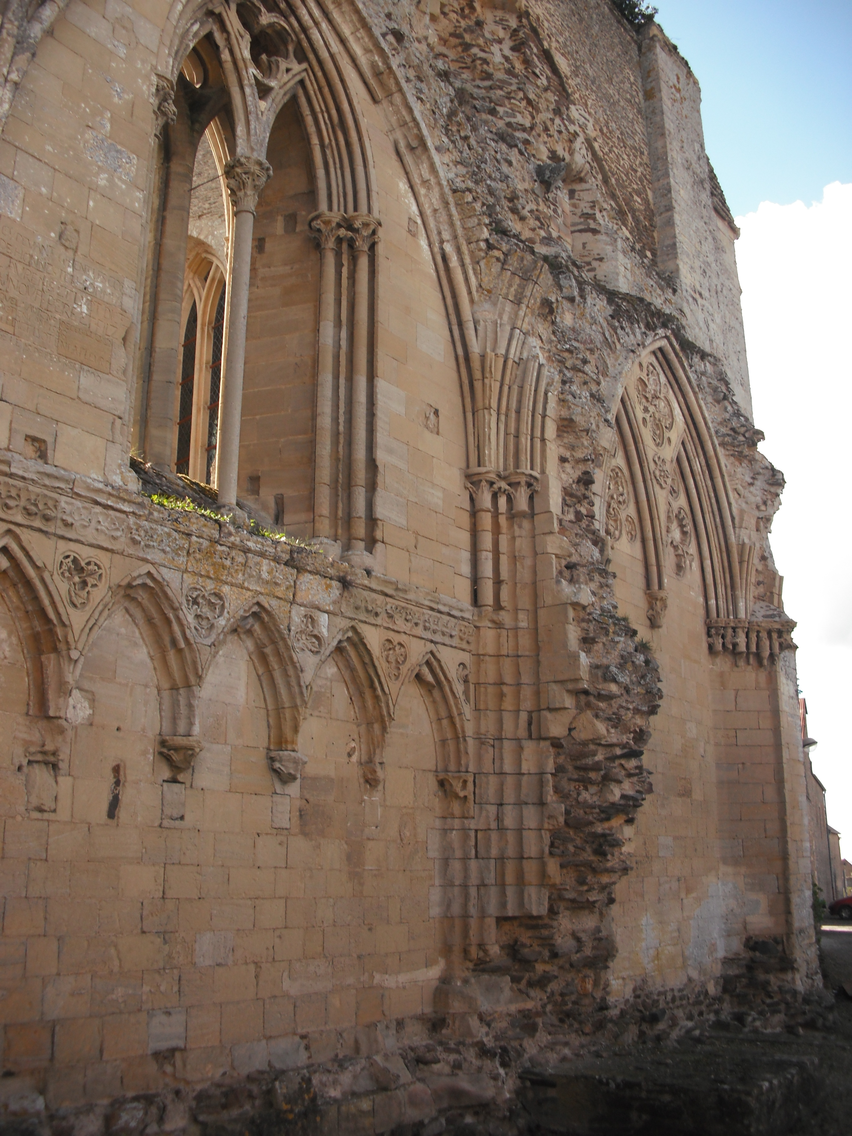 Mur gothique